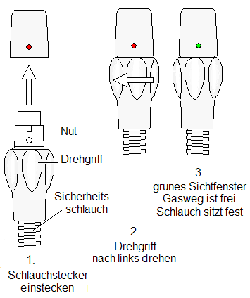 Gassteckdose